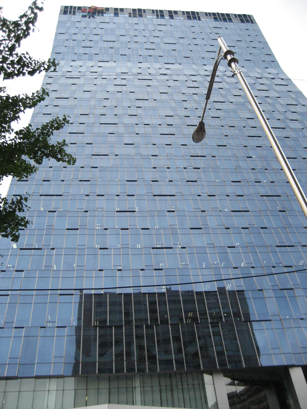 SKテレコム本社 (Seoul)